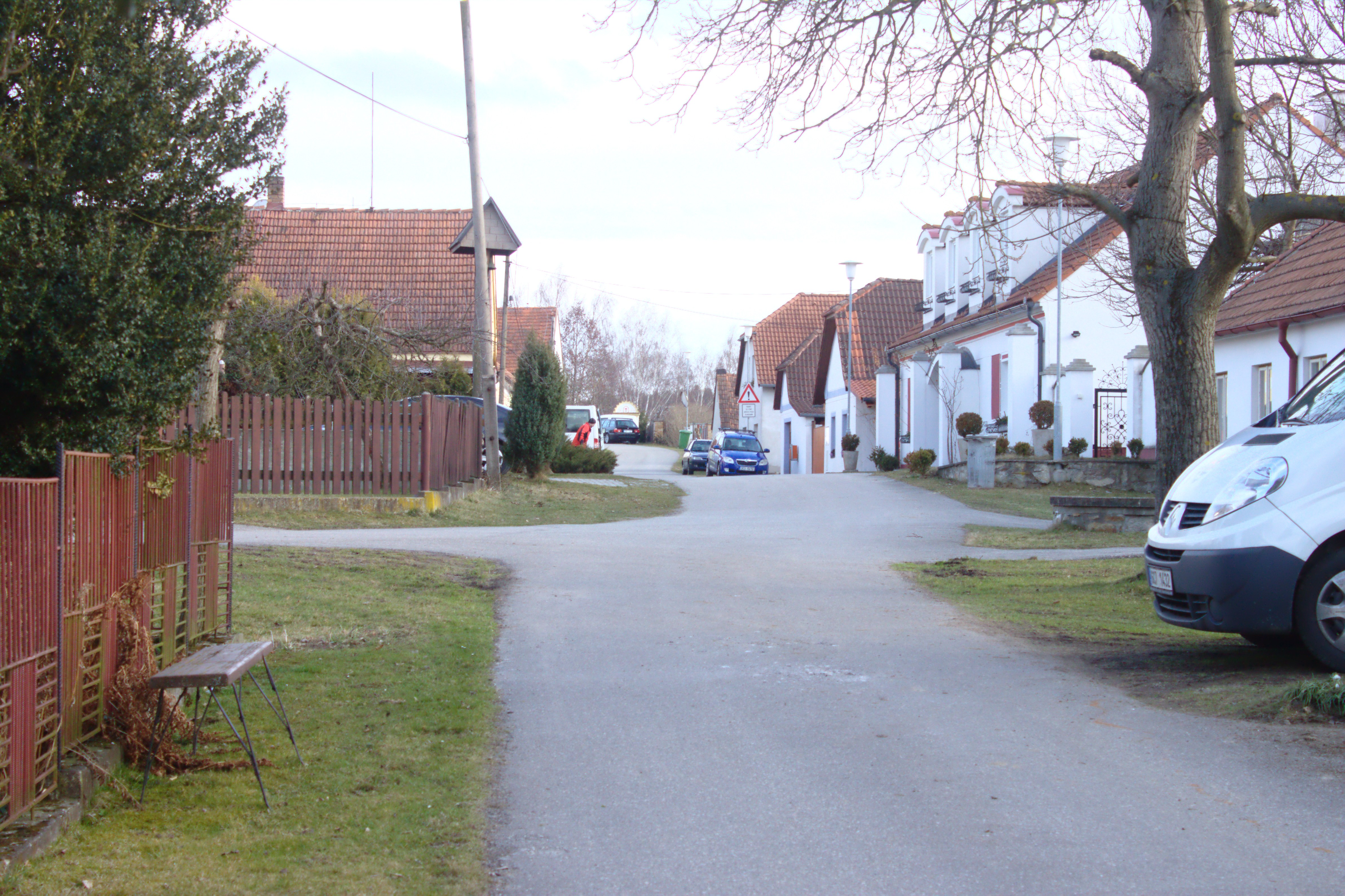 Hlavní silnice ve vesnici Koroseky Project: Fotíme Česko